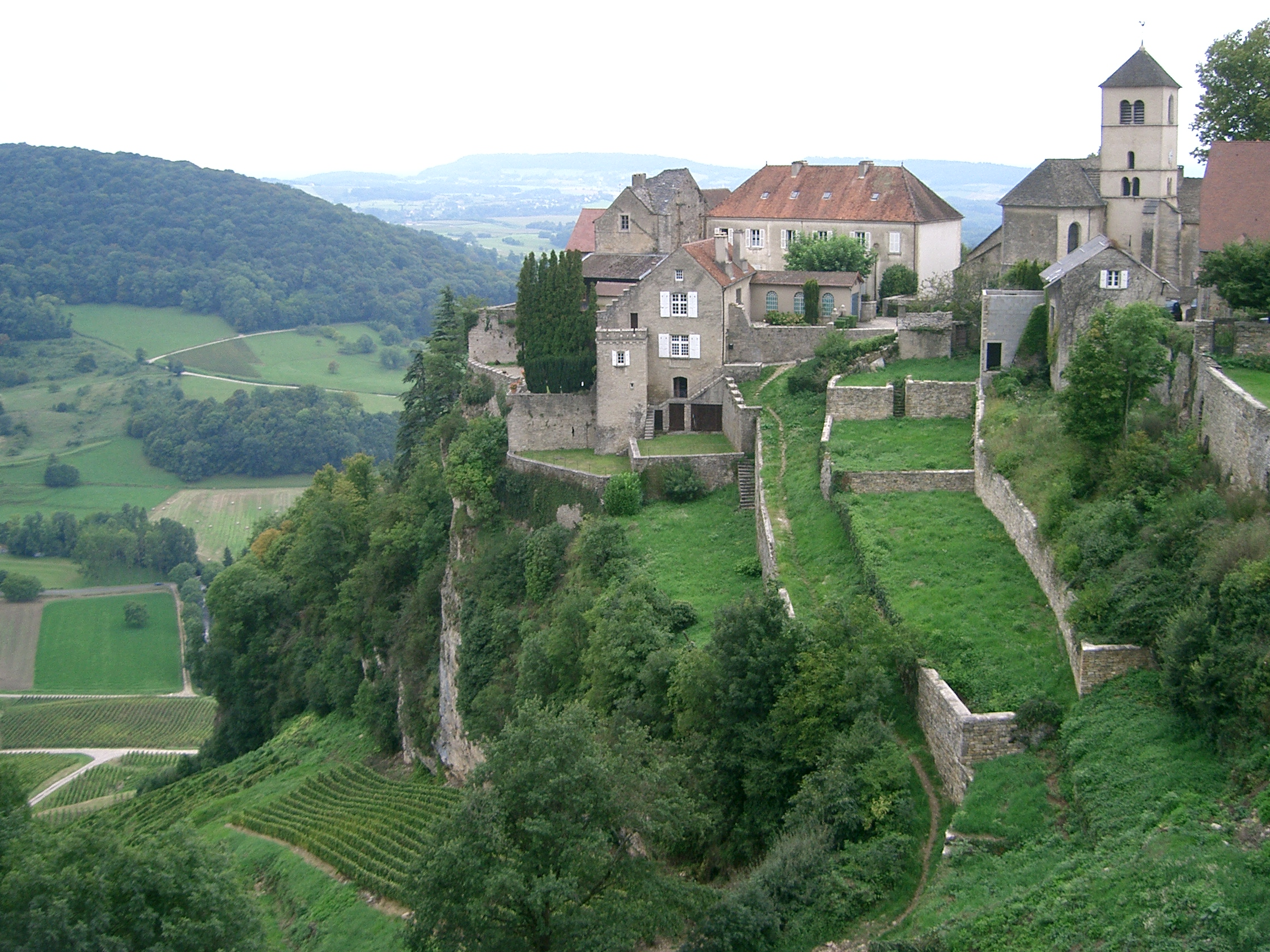 site de Château-Chalon - Jura (39) (France)